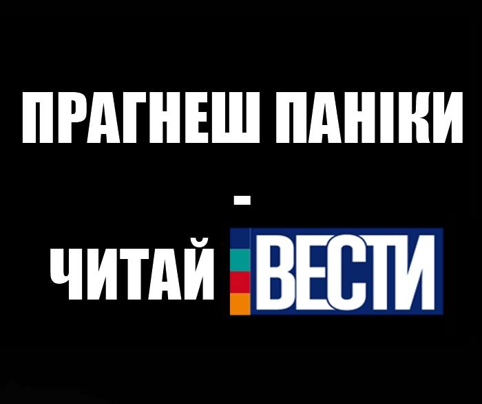 Одна із агітаційних інтернет-картинок проти газети «Весті». Використано файл: File:Vesti Guzhva newspaper.png.